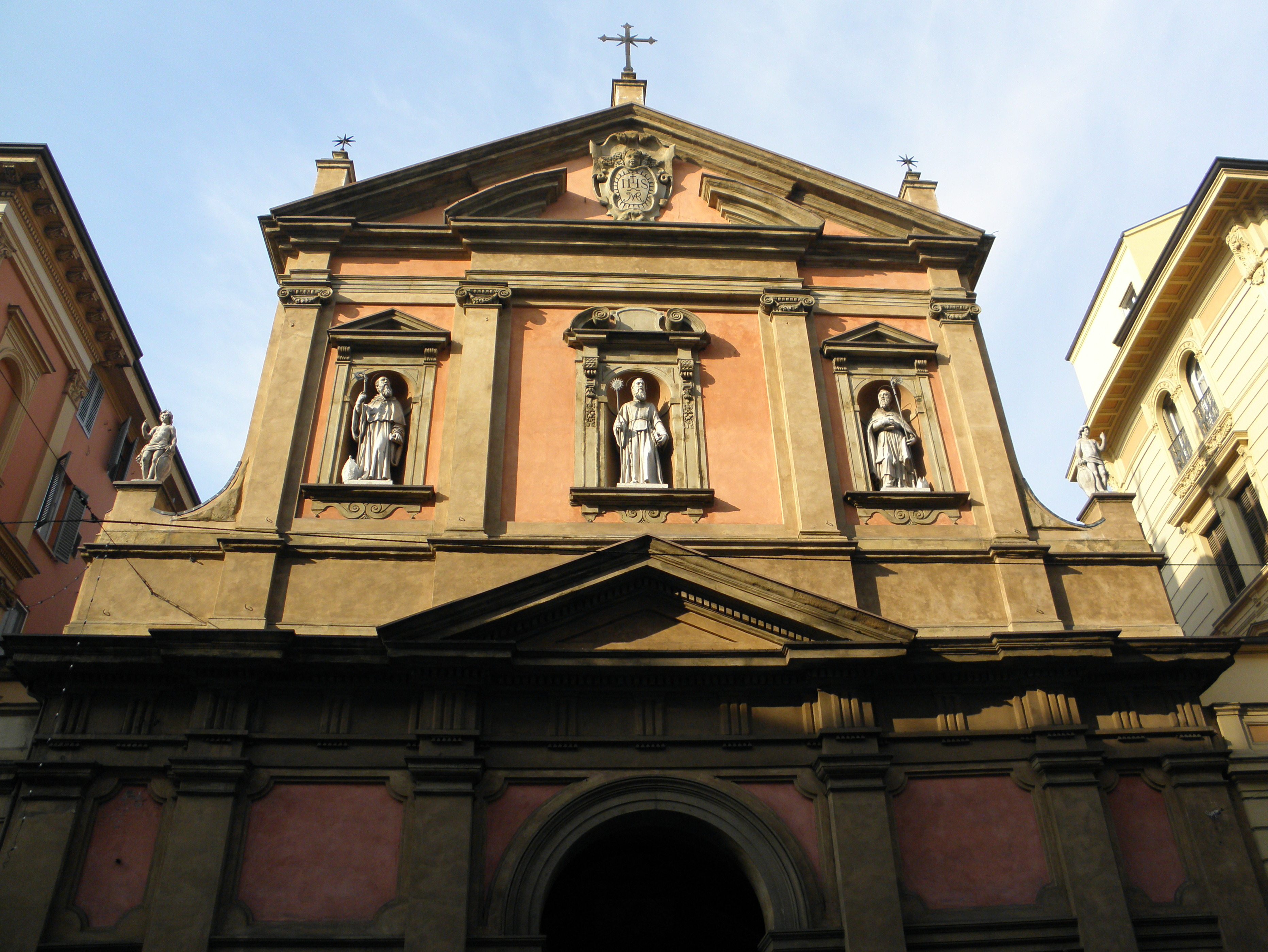 Bologna: la facciata della chiesa parrocchiale di San Benedetto.